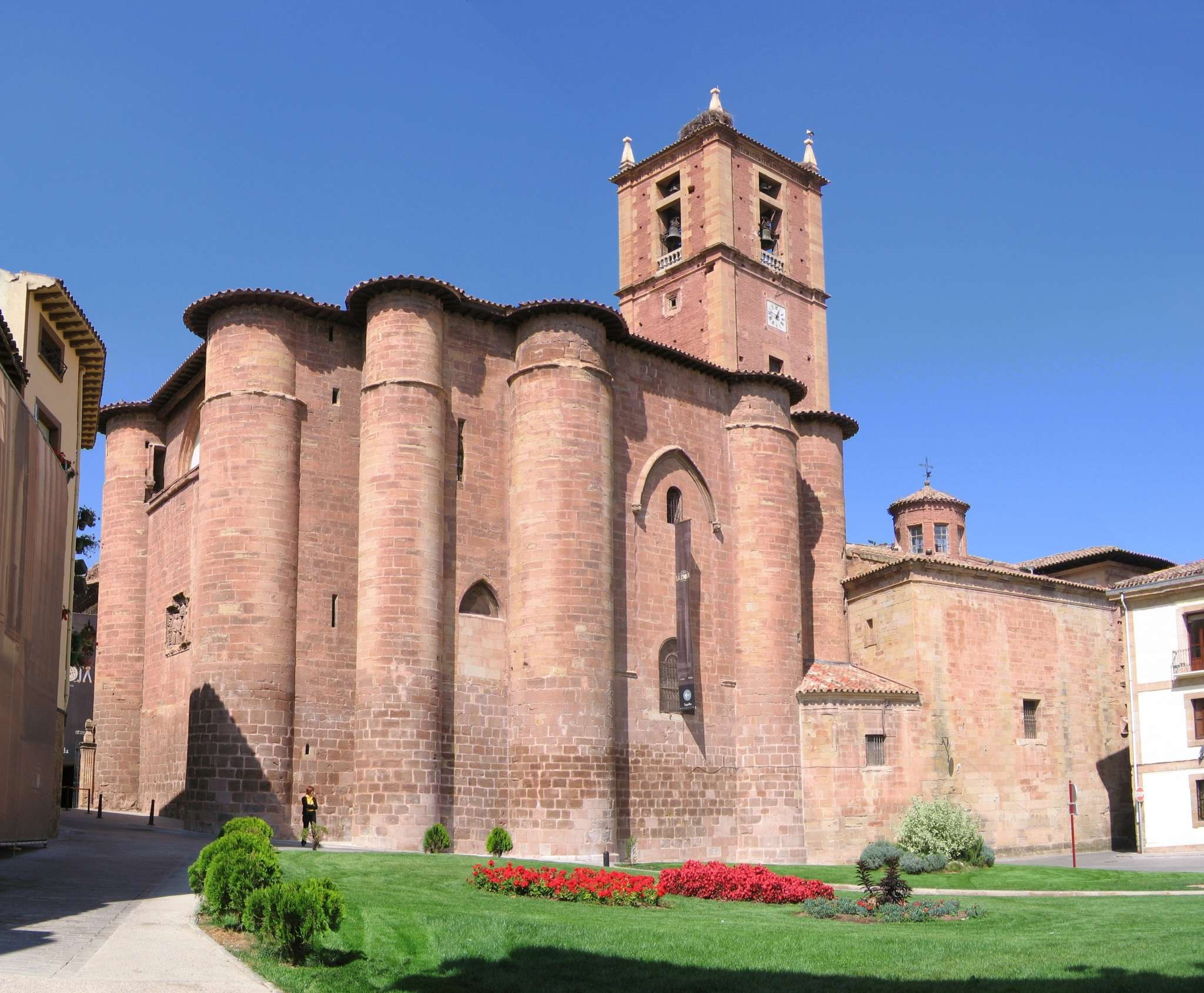 Ehemaliges Benediktinerkloster "Monasterio de Santa Maria la Real" in Najera, Spanien. Selbst fotografiert im Sept. 2005, GNU-FDL